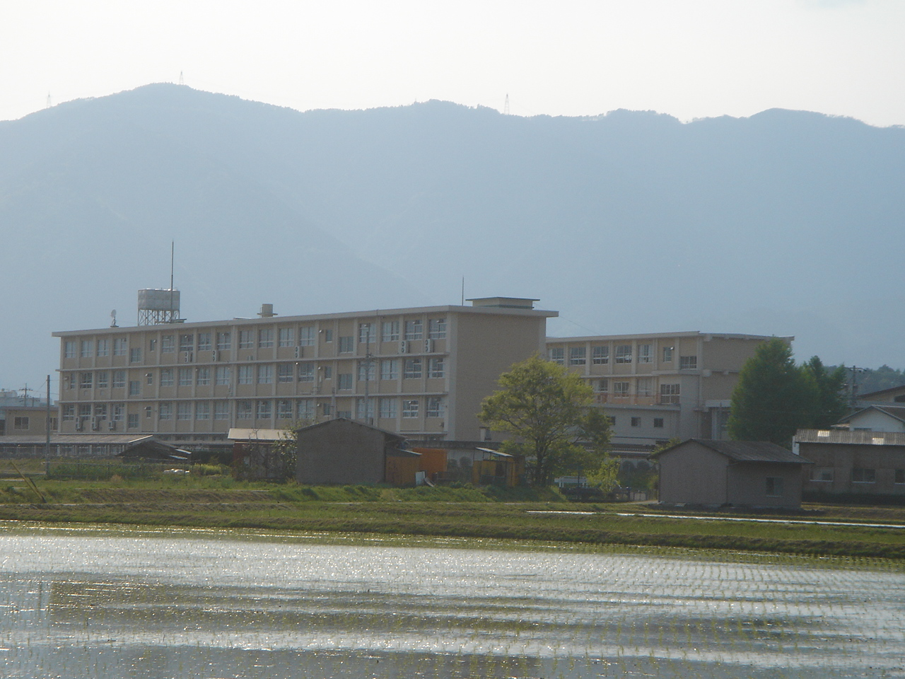 Ibi Senior Highschool(岐阜県立揖斐高等学校),Ibigawa,Gifu,Japan(岐阜県揖斐川町)で撮影